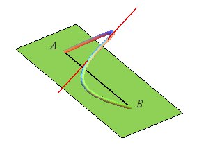 Illustration du théorème des accroissements finis généralisé